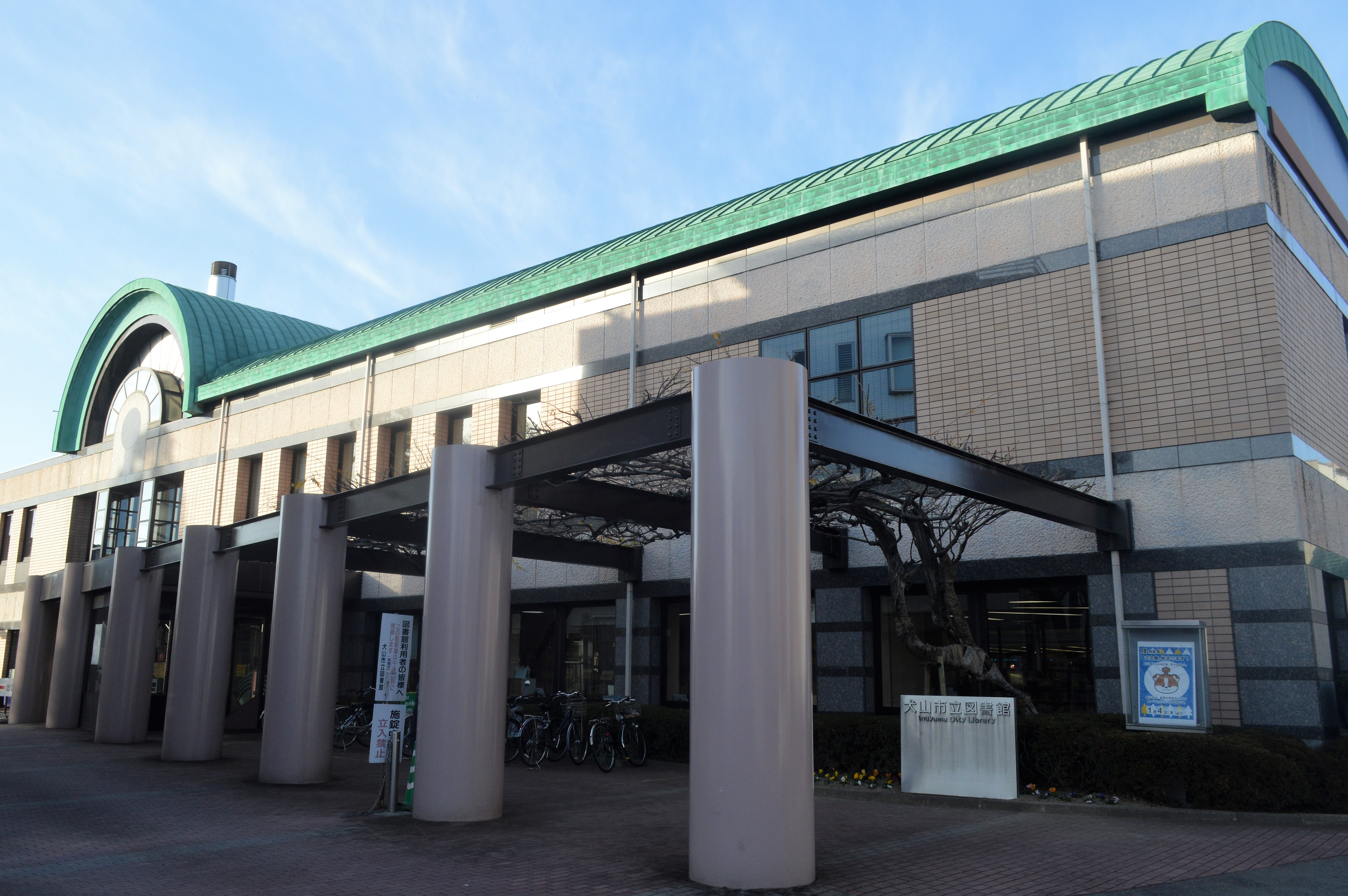 愛知県犬山市の犬山市立図書館。